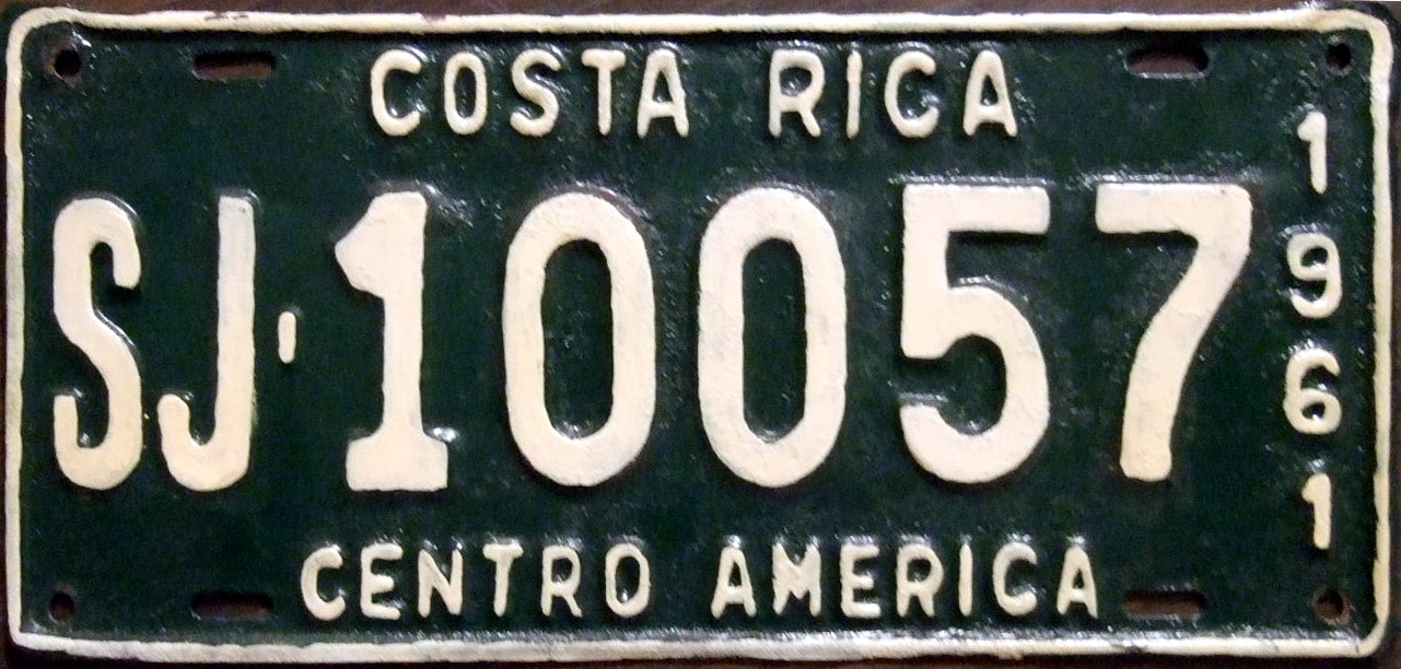 Costa Rica San Jose 1961 license plate